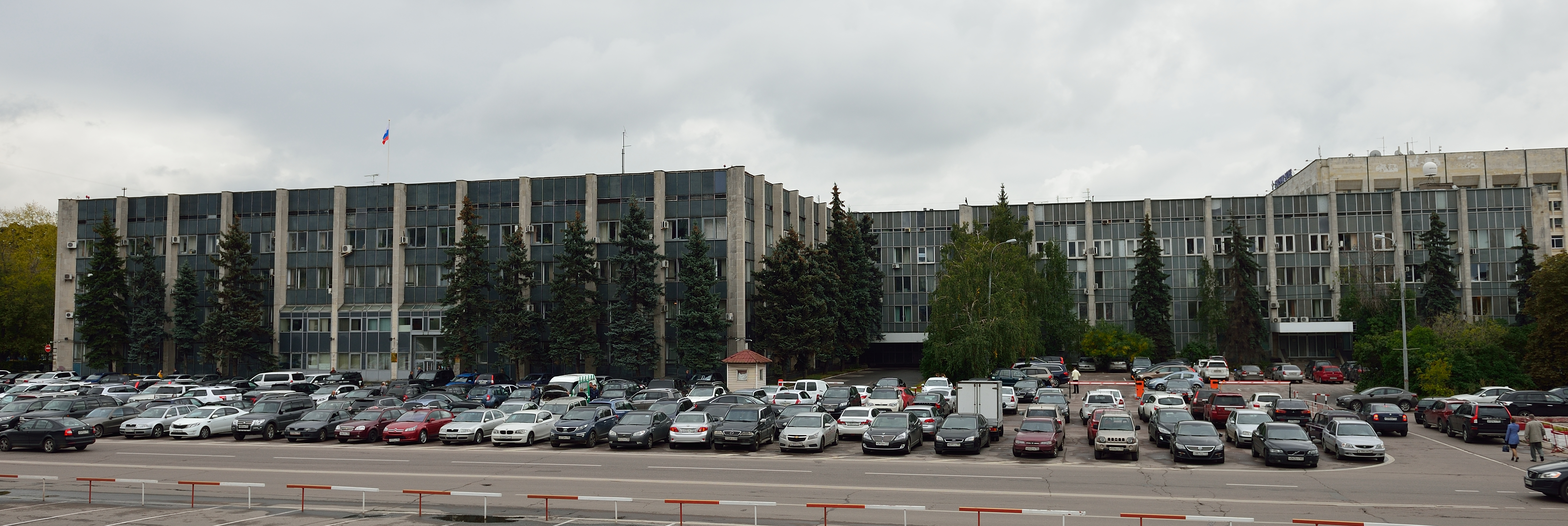 Ленинградский проспект, 37.